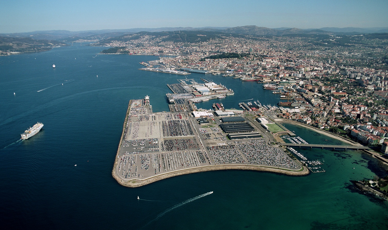 Panorámica de la zona franca y sede central del Consorcio en la ría de Vigo